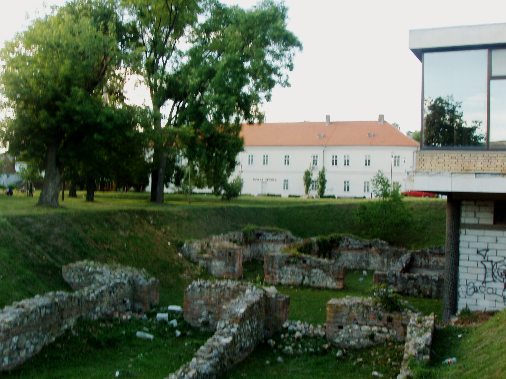 Руине економског дела Царске палате из доба старог Рима у градском средишту.